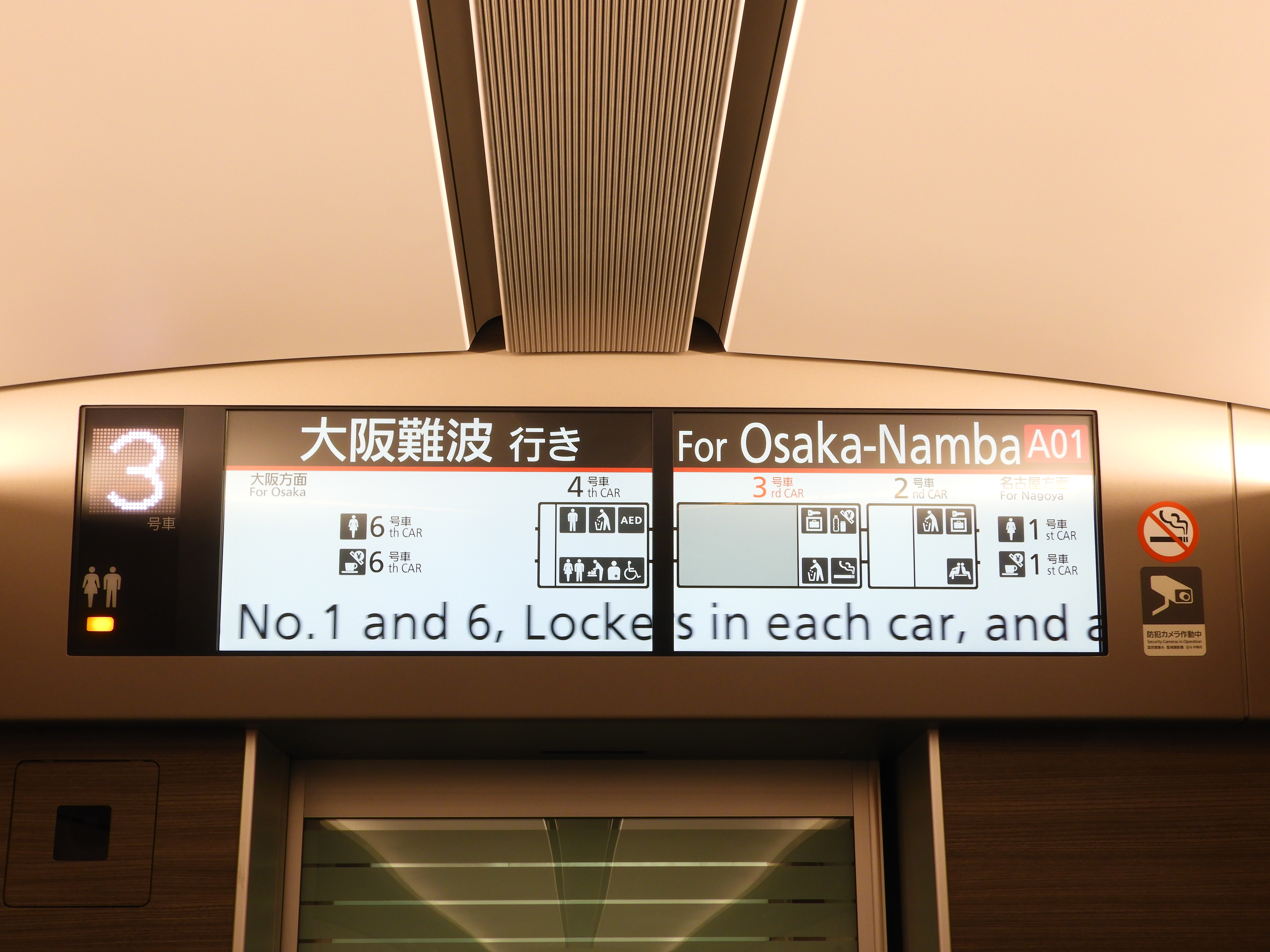 近鉄80000系の車内に設置されている案内LCD(大阪難波行き)